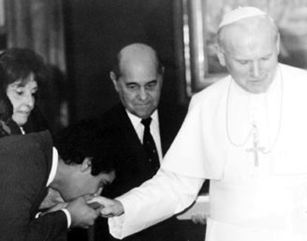 Aécio Neves participou da comitiva do presidente eleito Tancredo Neves, nas visitas oficiais aos governos da Itália, Portugal, Espanha, França, Estados Unidos, Peru e Argentina. Na Itália, eles também foram recebidos pelo papa João Paulo II. A viagem presidencial durou 15 dias. Foto: Arquivo Pessoal